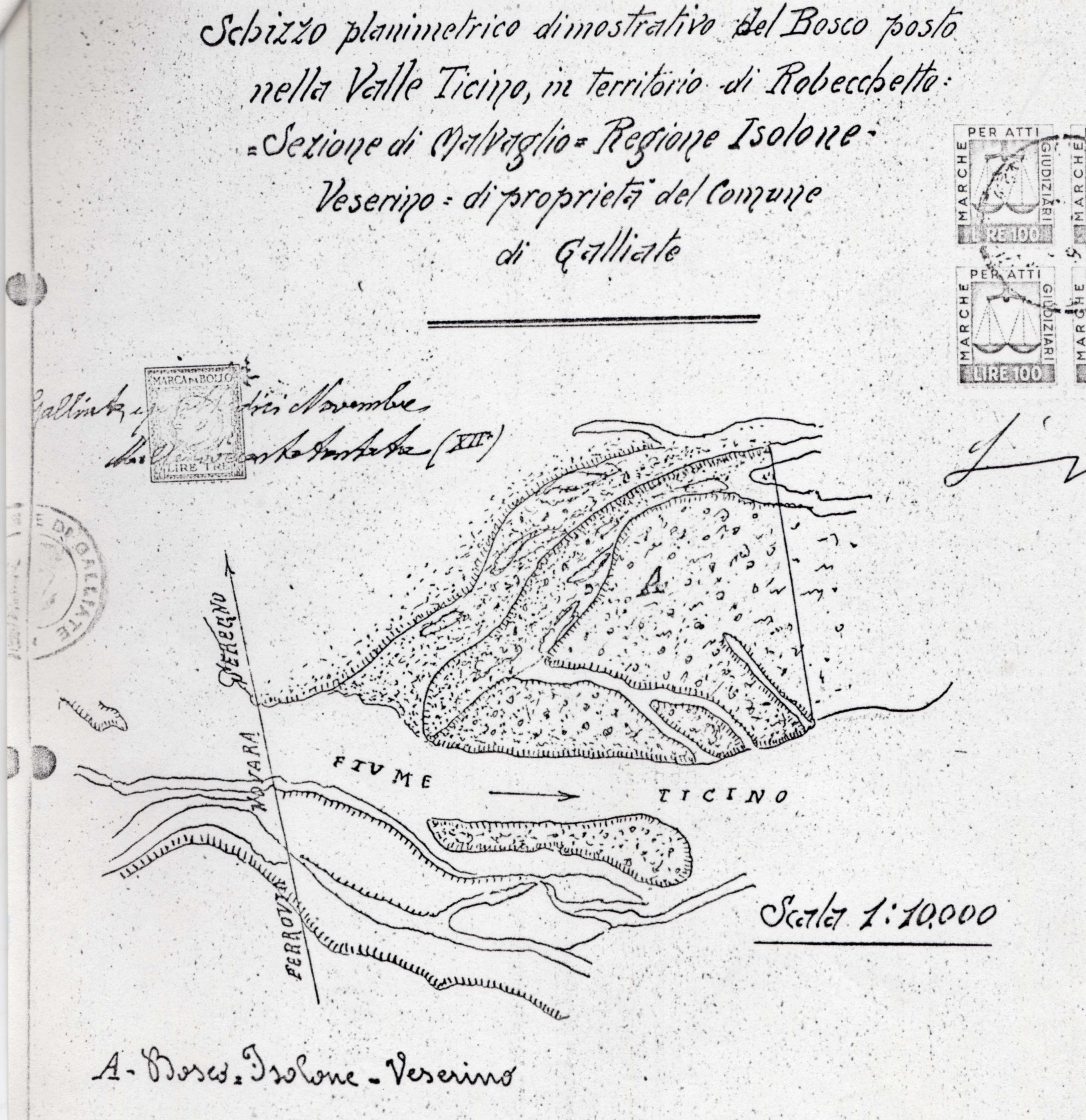 Bosco Isolone detto anche Veserino, posto nella Valle Ticino, in territorio di Robecchetto, in provincia di Milano (Ettari 30.10.73). Il 2 maggio 1934 venne venduto dal Comune di Galliate al Rag. Carlo Aliprandi fu Giovanni.